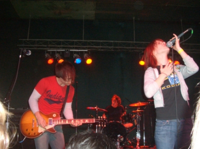 Imagen de Paramore en el Winter Go West Tour, en enero de 2006.